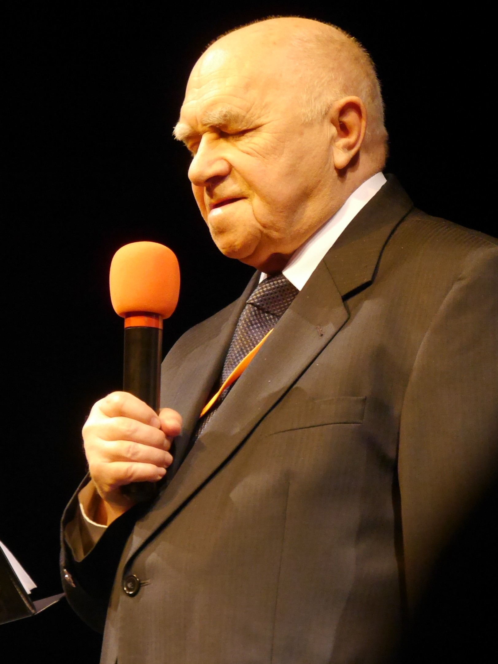 Andrzej Filipowicz, Weltmeisterschaft der Senioren 2016 in Marienbad